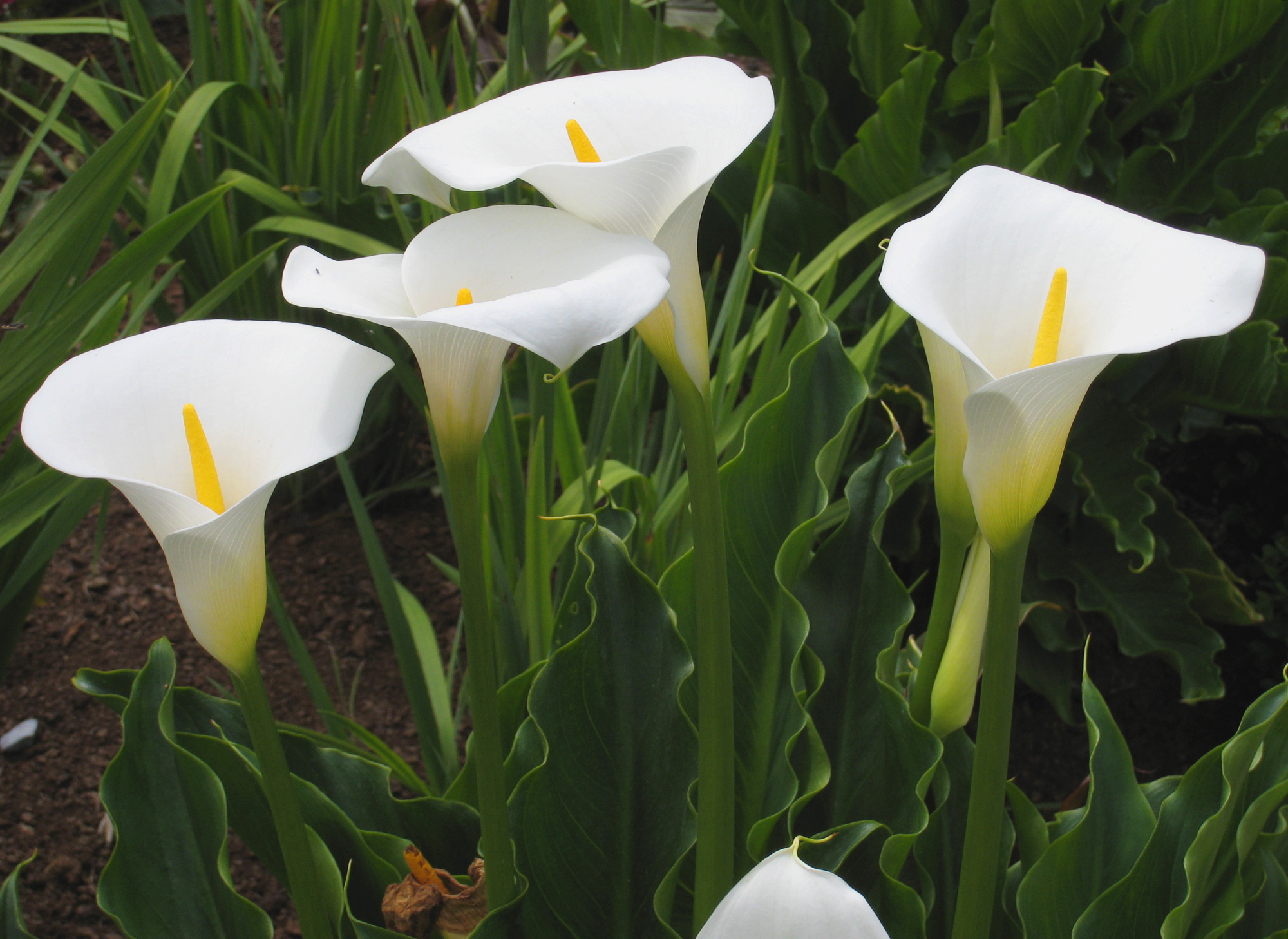 Château de Cheverny, Loir-et-Cher, France - gardens, Zantedeschien